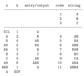 Exemple del codi ziv-lempel